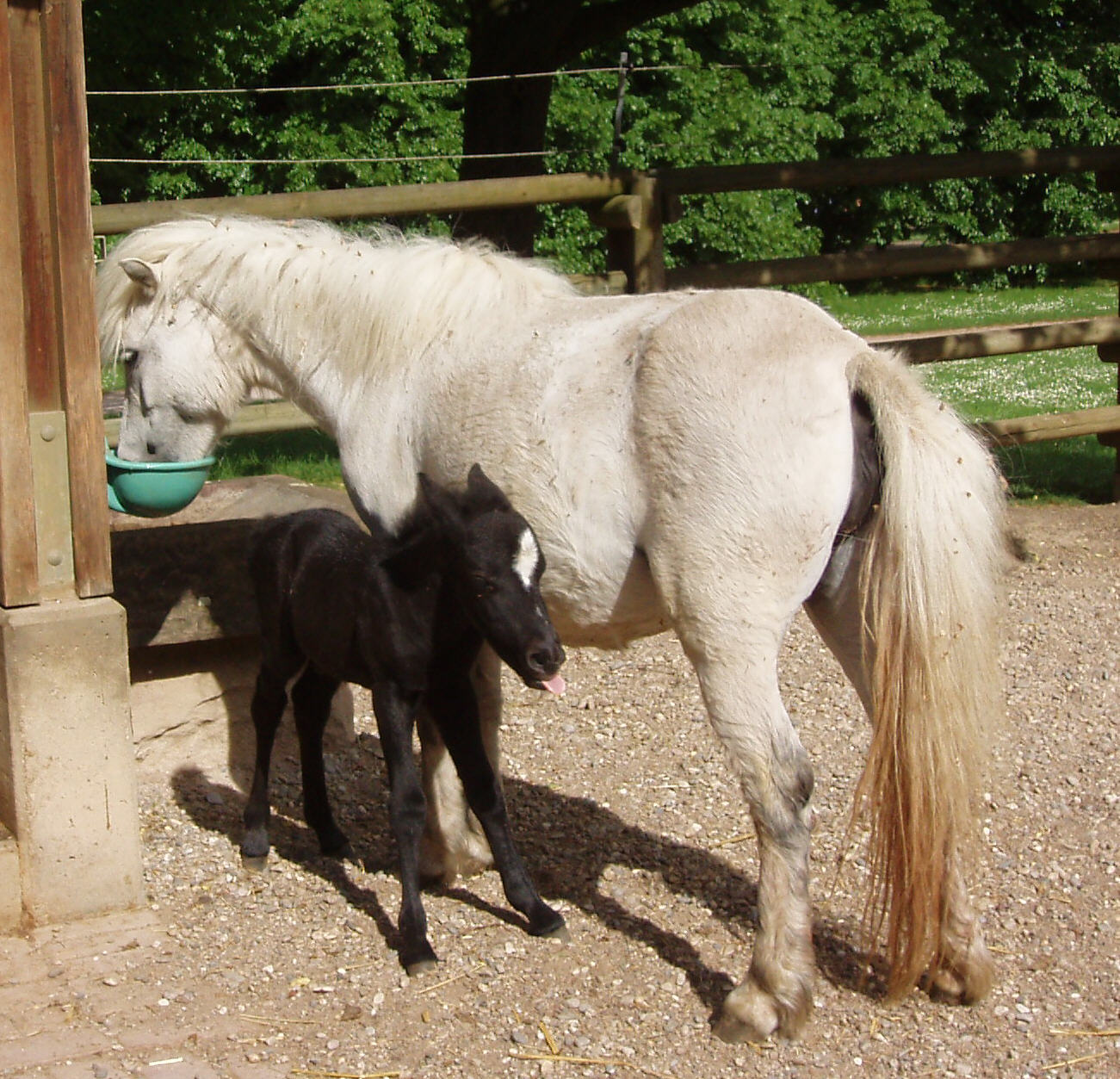 Ponyfohlen am ersten Lebenstag